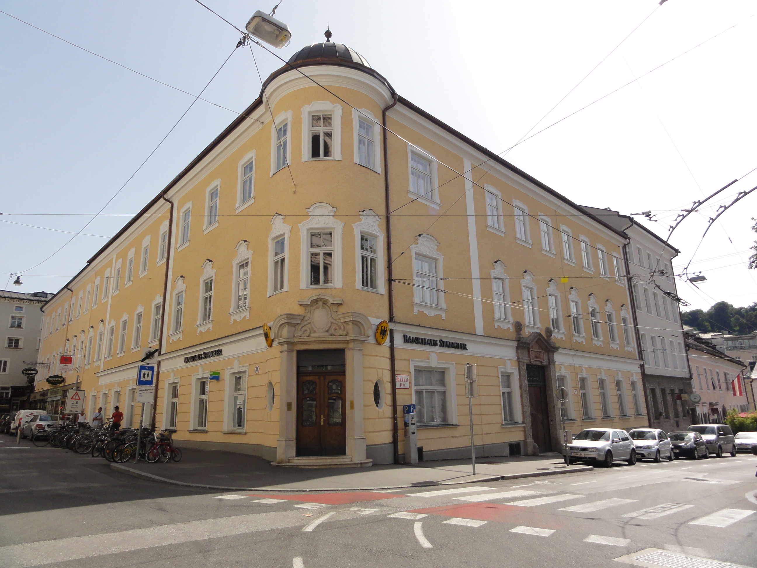 Austria, Bundesland Salzburg, Salzburg, Dreifaltigkeitsgasse 11